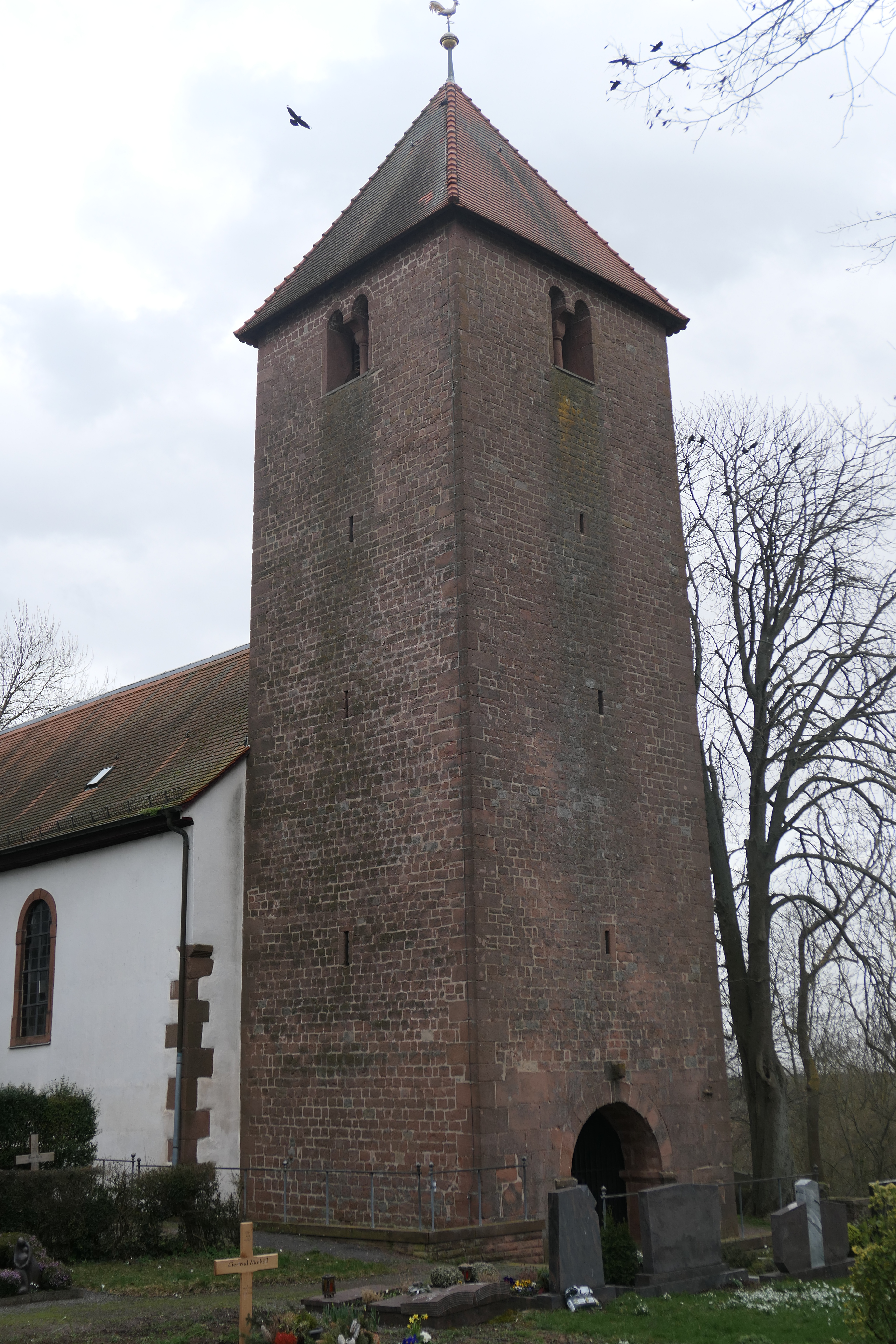 Romanesque church towers in Rhineland-Palatinate Wollmesheim ehemals St. Mauritius, Westturm 1094–1105 Portal